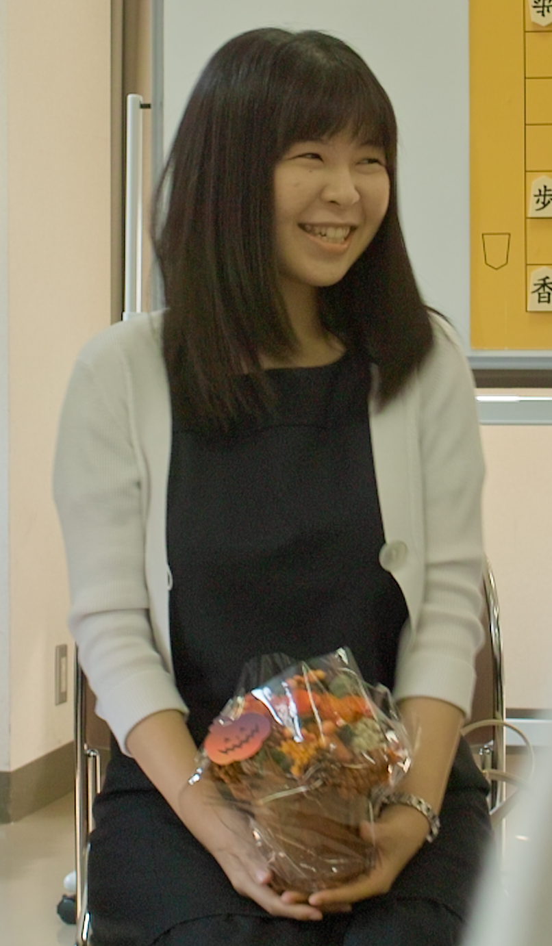 伊藤沙恵女流二段。2016年10月2日、棋士会みやぎ復興将棋フェスティバルにて。